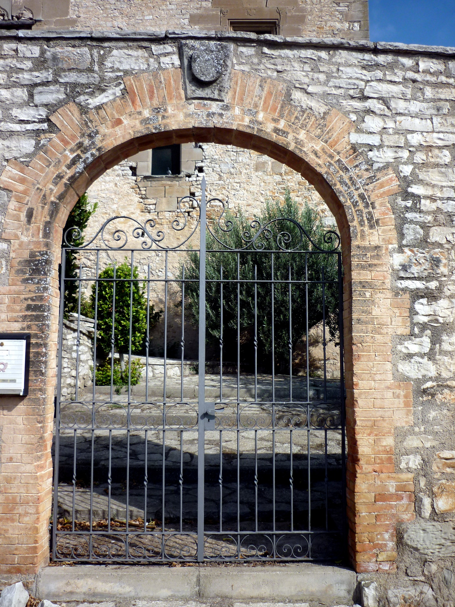 Castell d'Estaràs: Portal